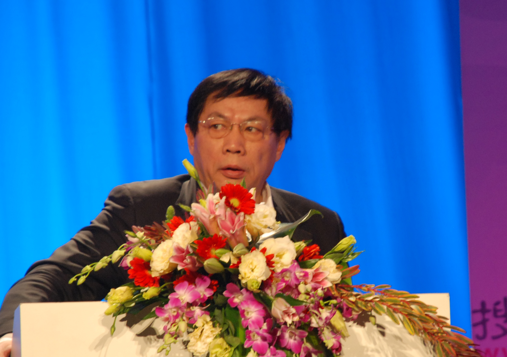 2012中国地产新视角任志强主旨演讲